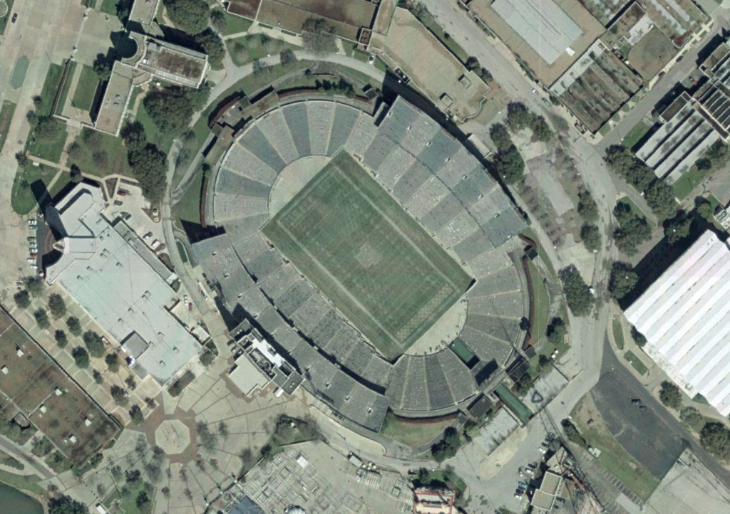 Cotton Bowl (stadium)